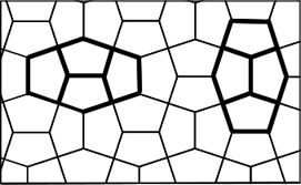 teselación de El Cairo, Cairo Tessellation